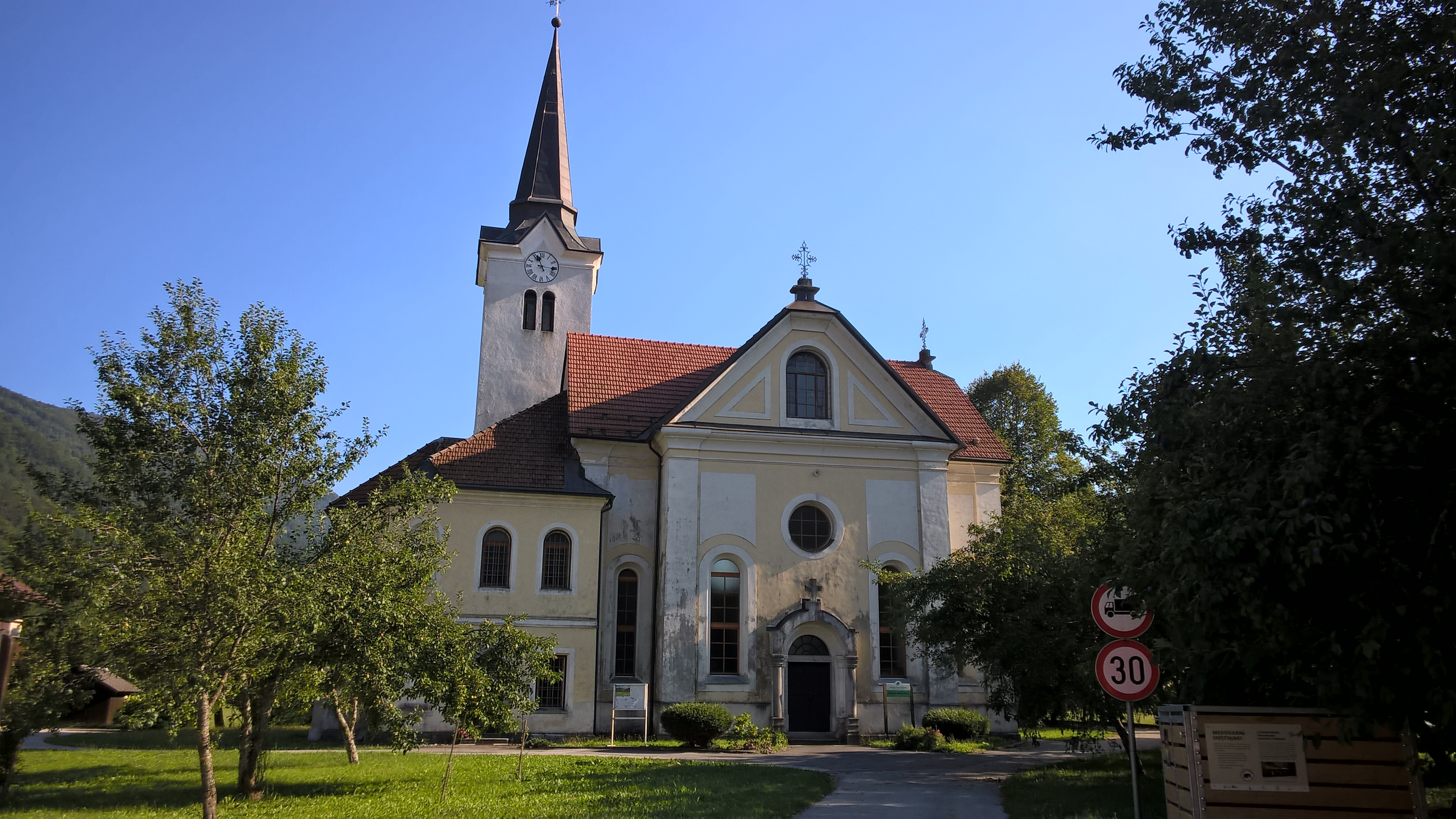 Cerkev svetega Petra in Pavla v Osilnici